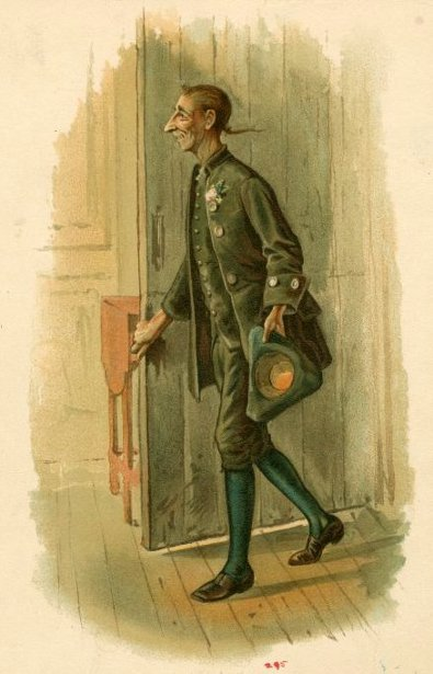 Edwin Austin Abbey